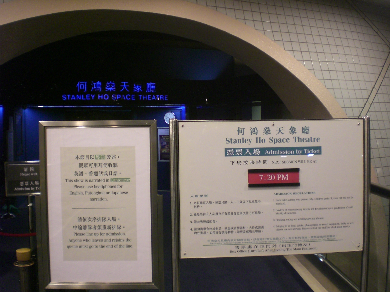 香港太空館何鴻桑天象廳內